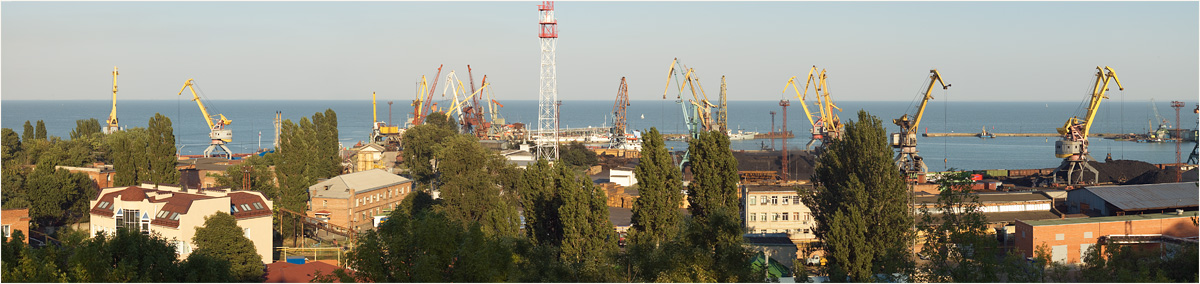 Таганрогский морской торговый порт.